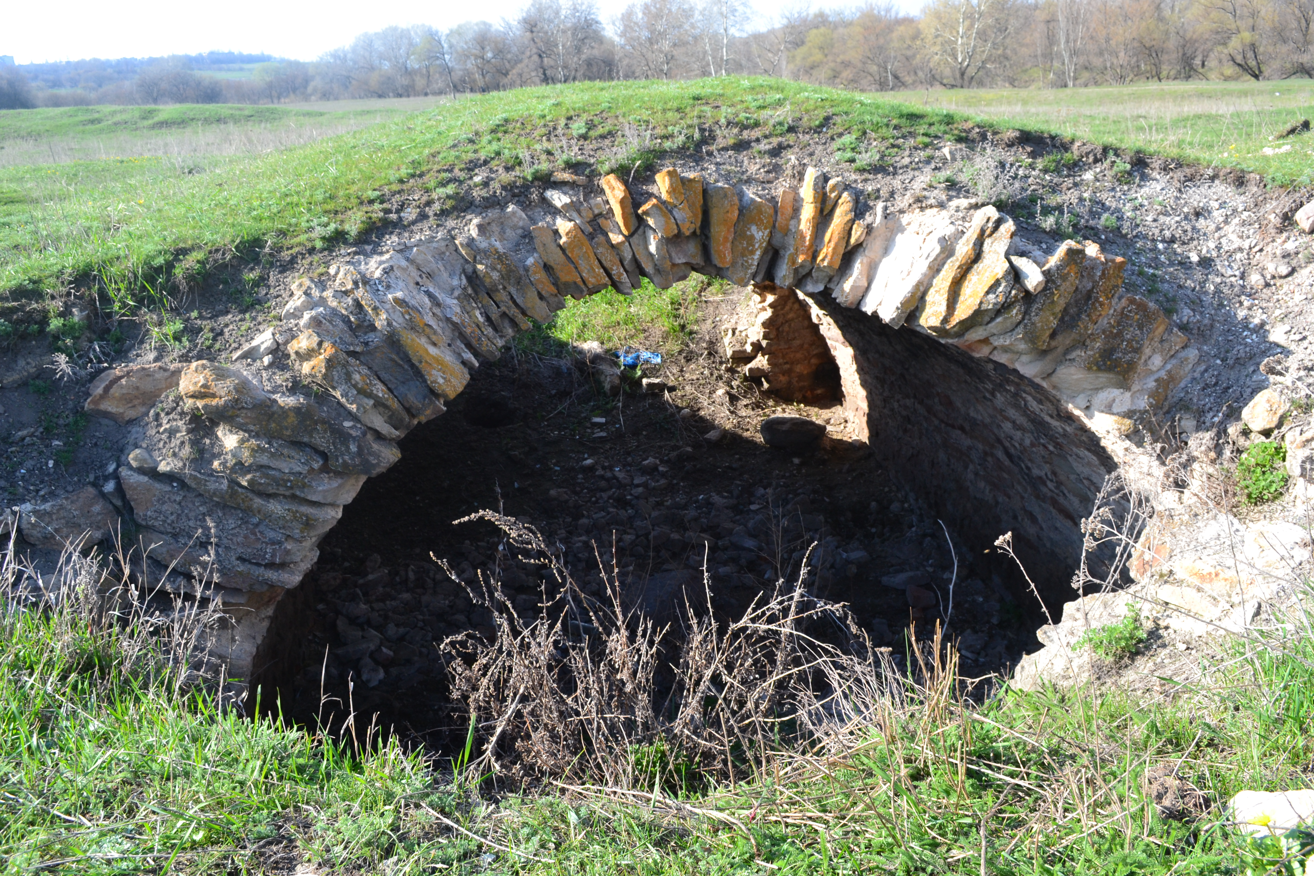 Біла Гора (Попаснянський район) Луганська обл. Україна